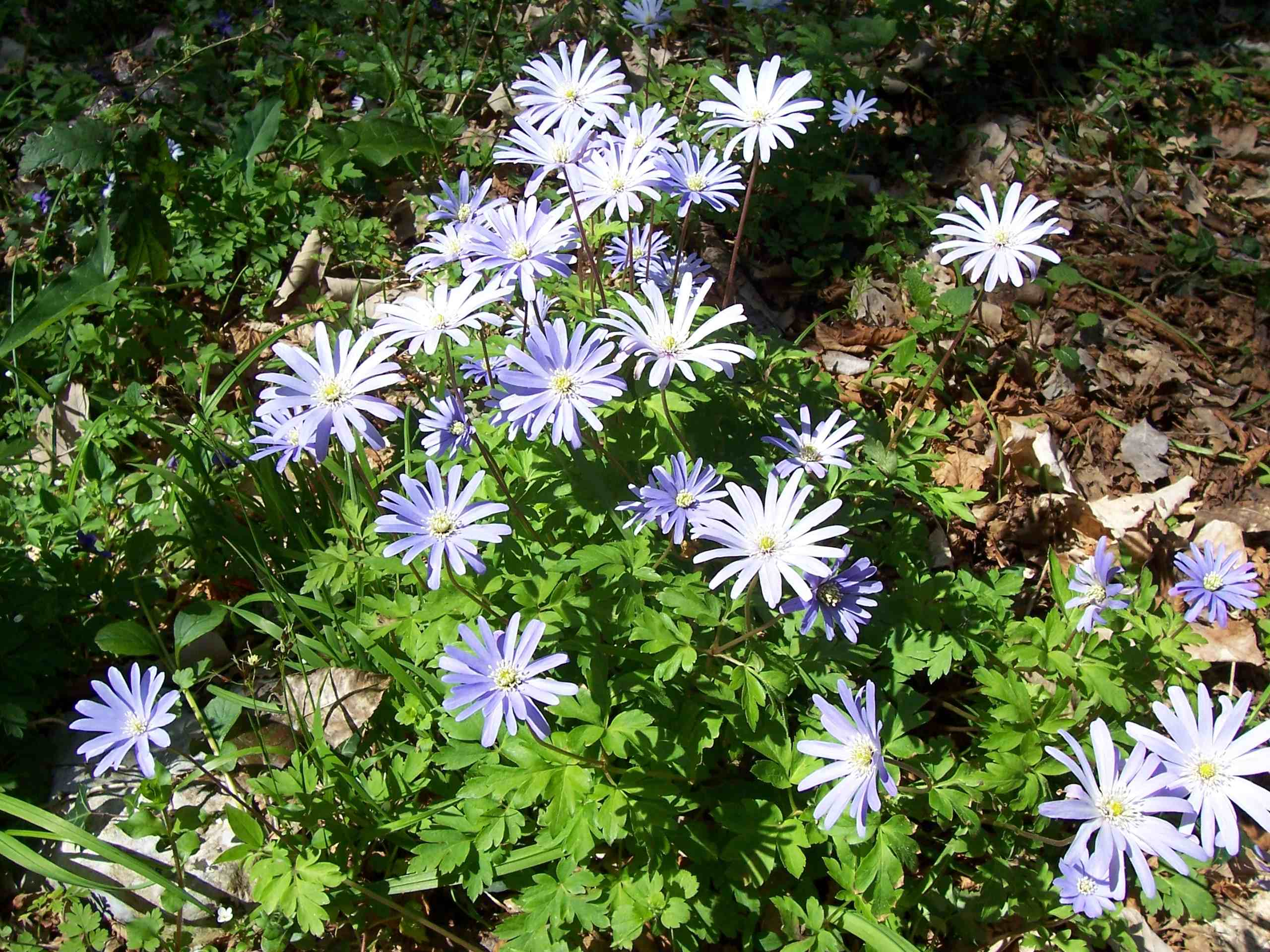 Anemone apennina